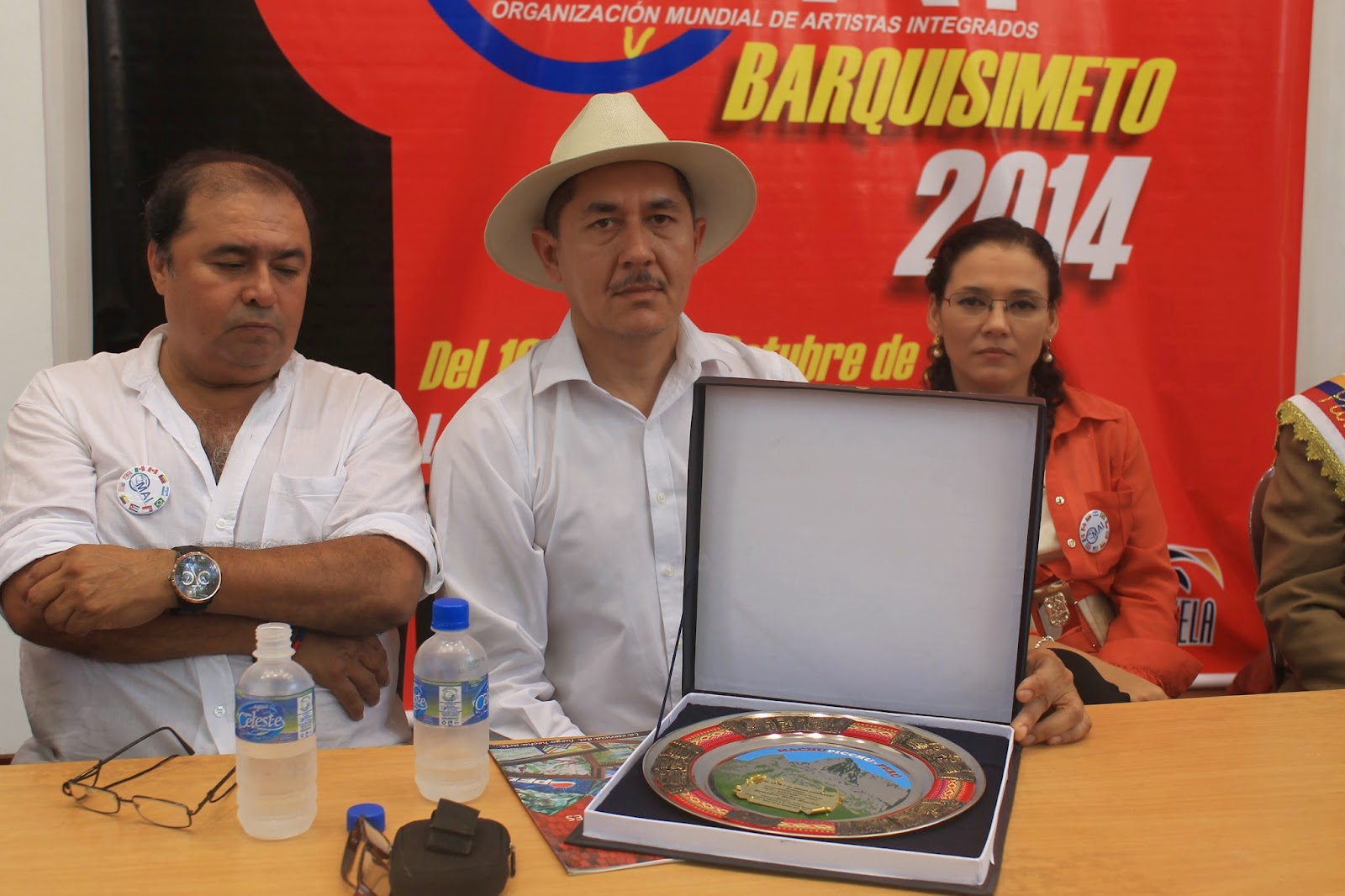 El pintor sinaloense recibió distinción por su trayectoria